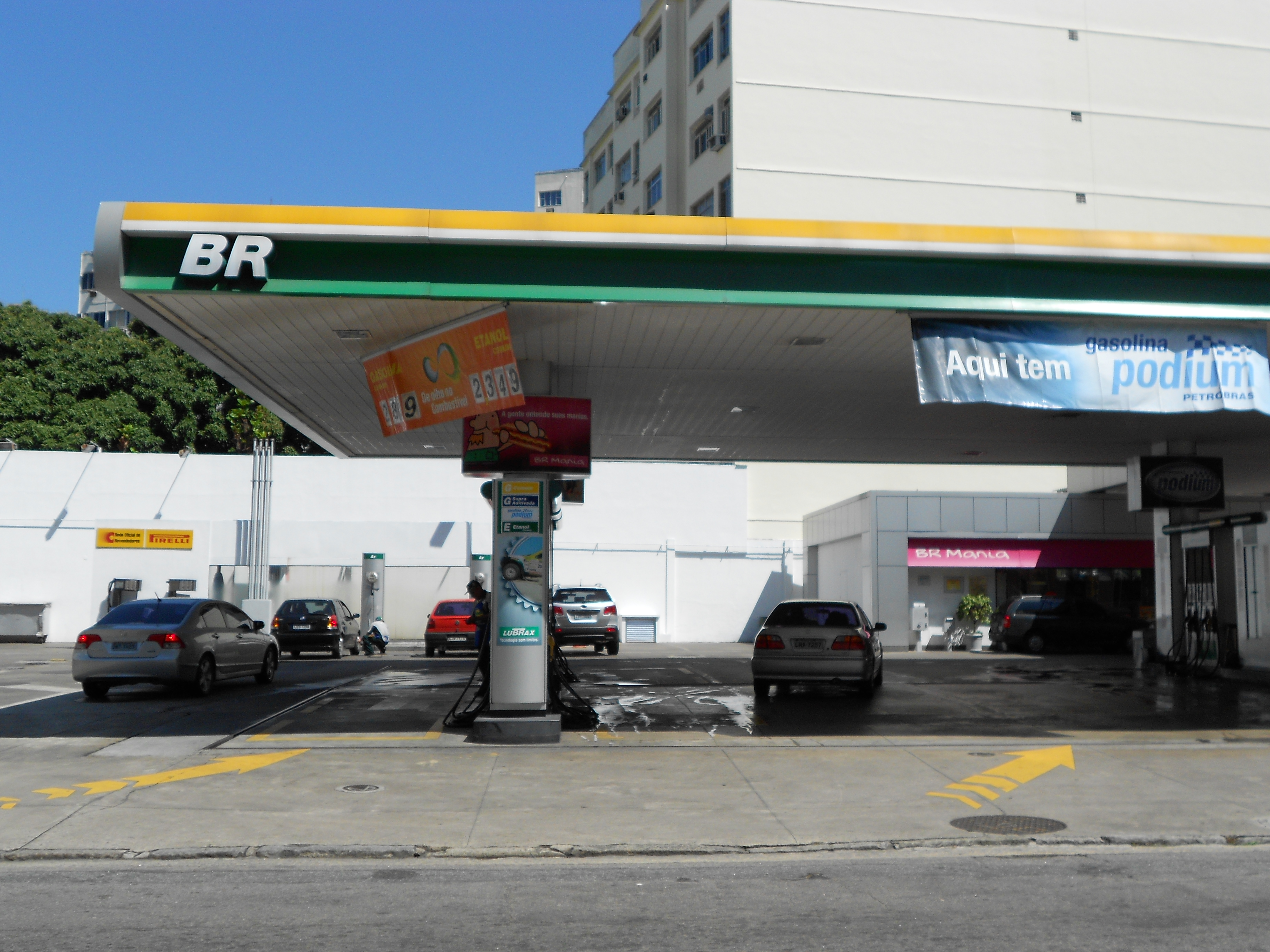 Vista de la gasolinera Petrobras, en la Rua das Laranjeiras, en el barrio Laranjeiras, en la ciudad de Río de Janeiro, Brasil.